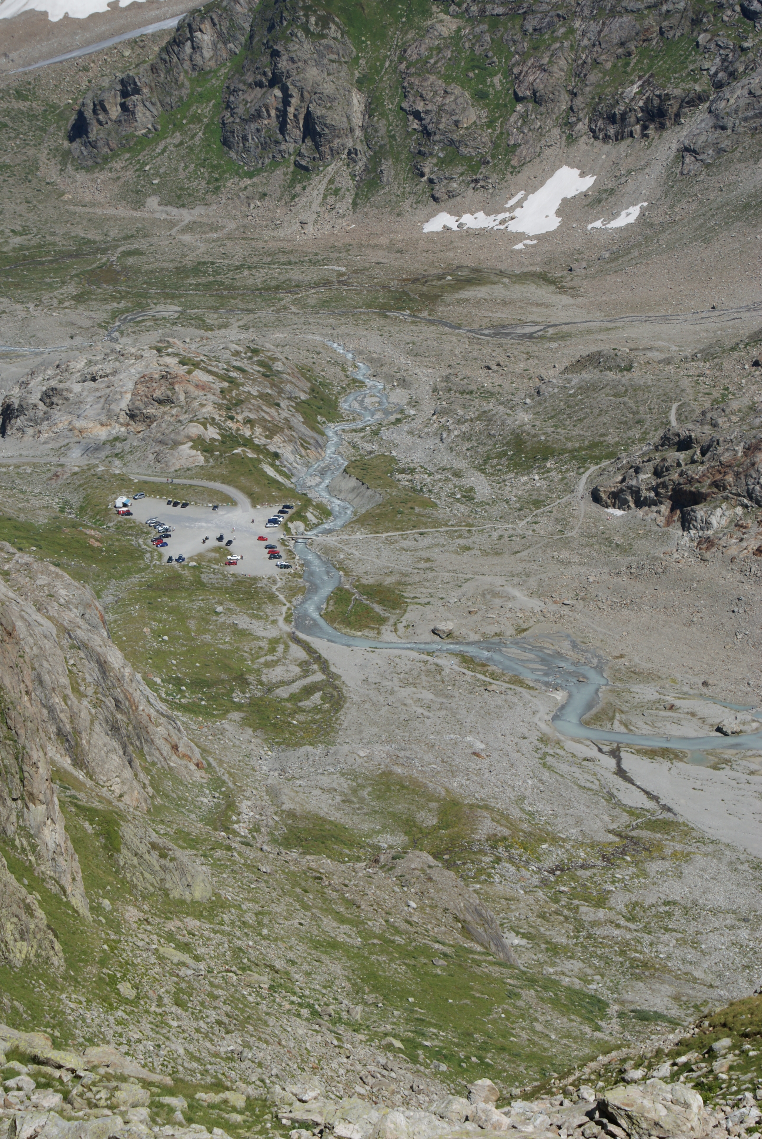 Steinwasser unterhalb des Steingletschers in Gadmen, Gemeinde Innertkirchen, Kanton Bern, Schweiz. In der Bildmitte ist ein Parkplatz zu sehen, rechts davon das junge Steinwasser (Gadmerwasser). Das Bild wurde vom Schafberg südwestlich des Parplatzes aufgenommen.